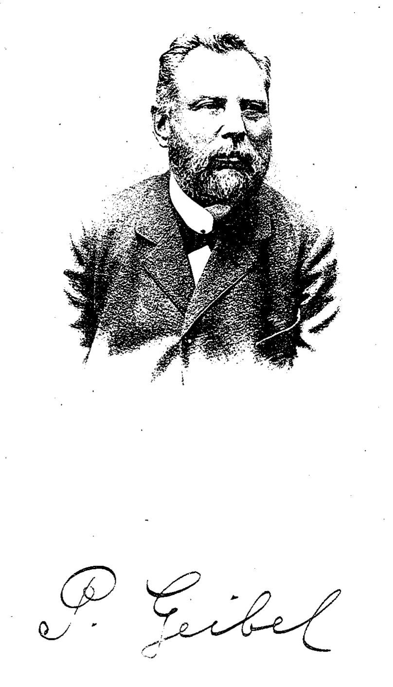 Peter Geibel. (1841-1901) In: Mein schinste Gruß d'r Wearreraa. Friedberg: C. Scriba.